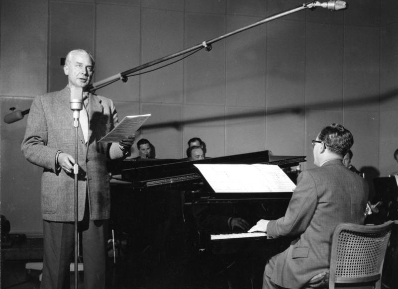 Funkhaus Köln: Hans Bund mit seinem Orchester während einer Probe mit dem Schlagersänger und Schallplattenliebling Willi Schneider im Studioraum.